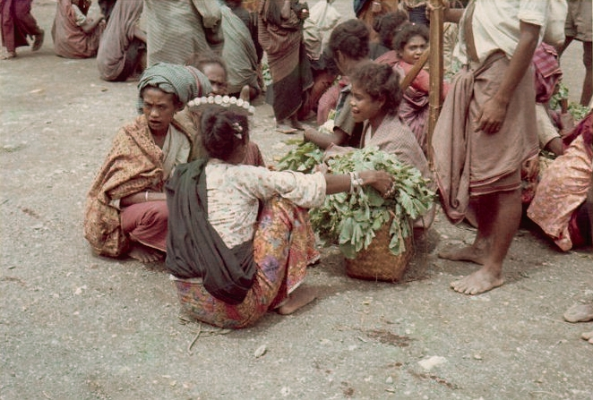 Um pente de decoração com moedas de prata na cabeça da figura central.